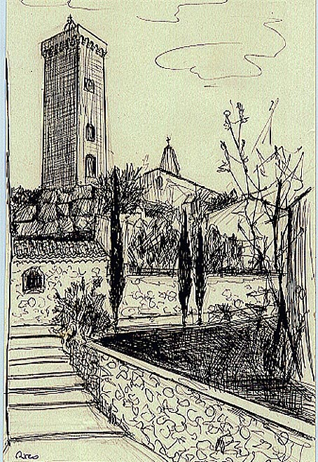 La tour, l'église et le poulailler à Saint-Martin-de-Bromes, dessin à la plume par Enrico Campagnola.